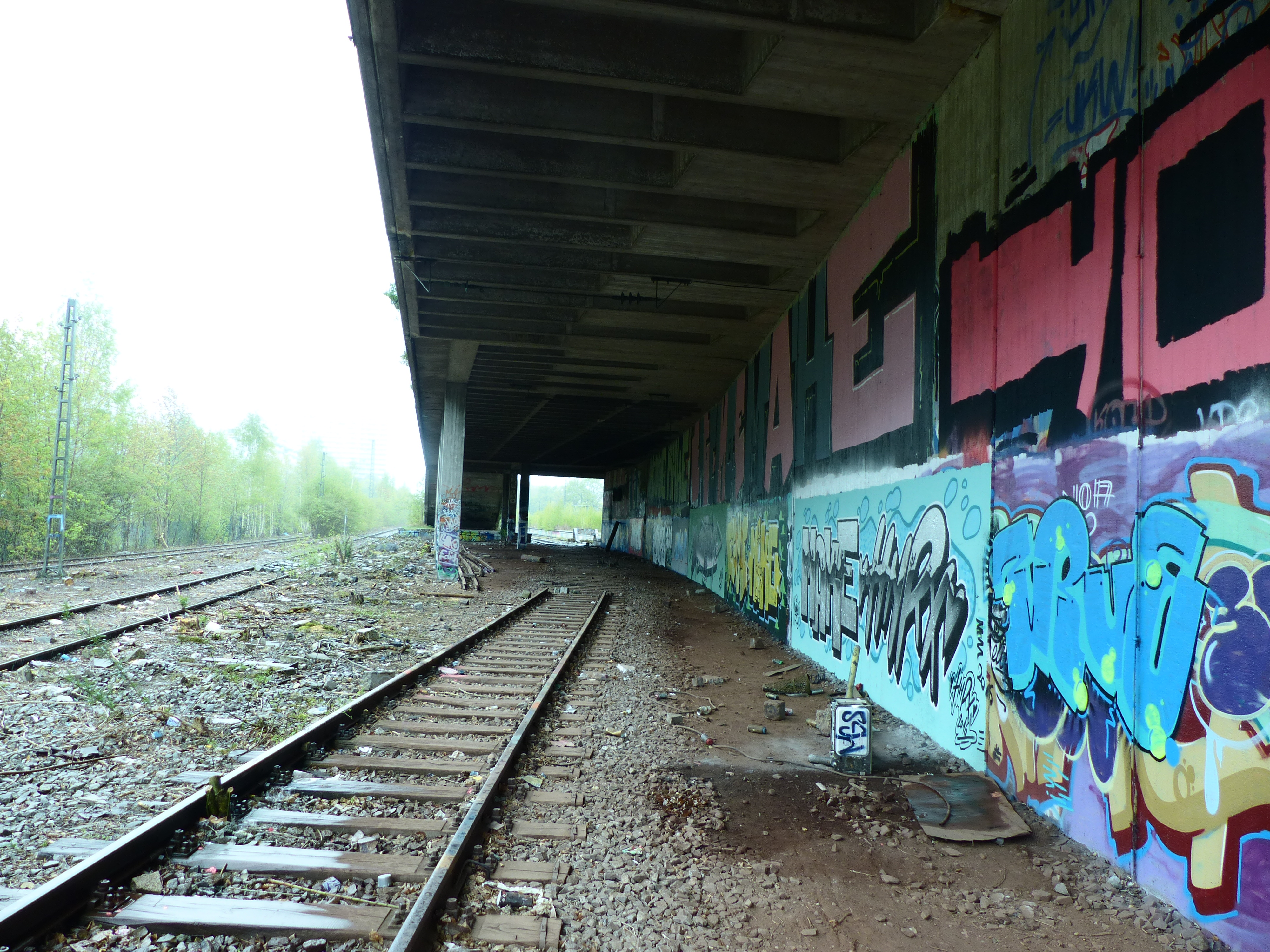 Blick von Süden in den Tunnel des S-Bahnhof Olympiapark (Gleis 3)